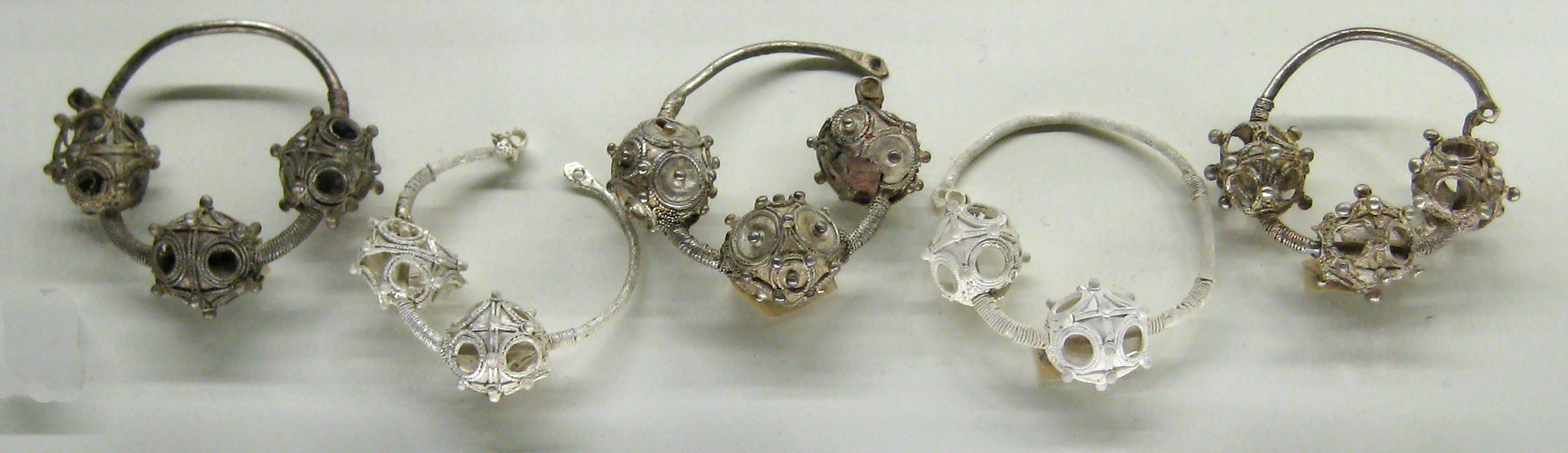 Клады, выставленные в подклете Благовещенского собора Московского кремля. Трехбусинные височные кольца-подвески к головному убору. Русь, ок. 1200. Серебро, пайка, зернь, скань.